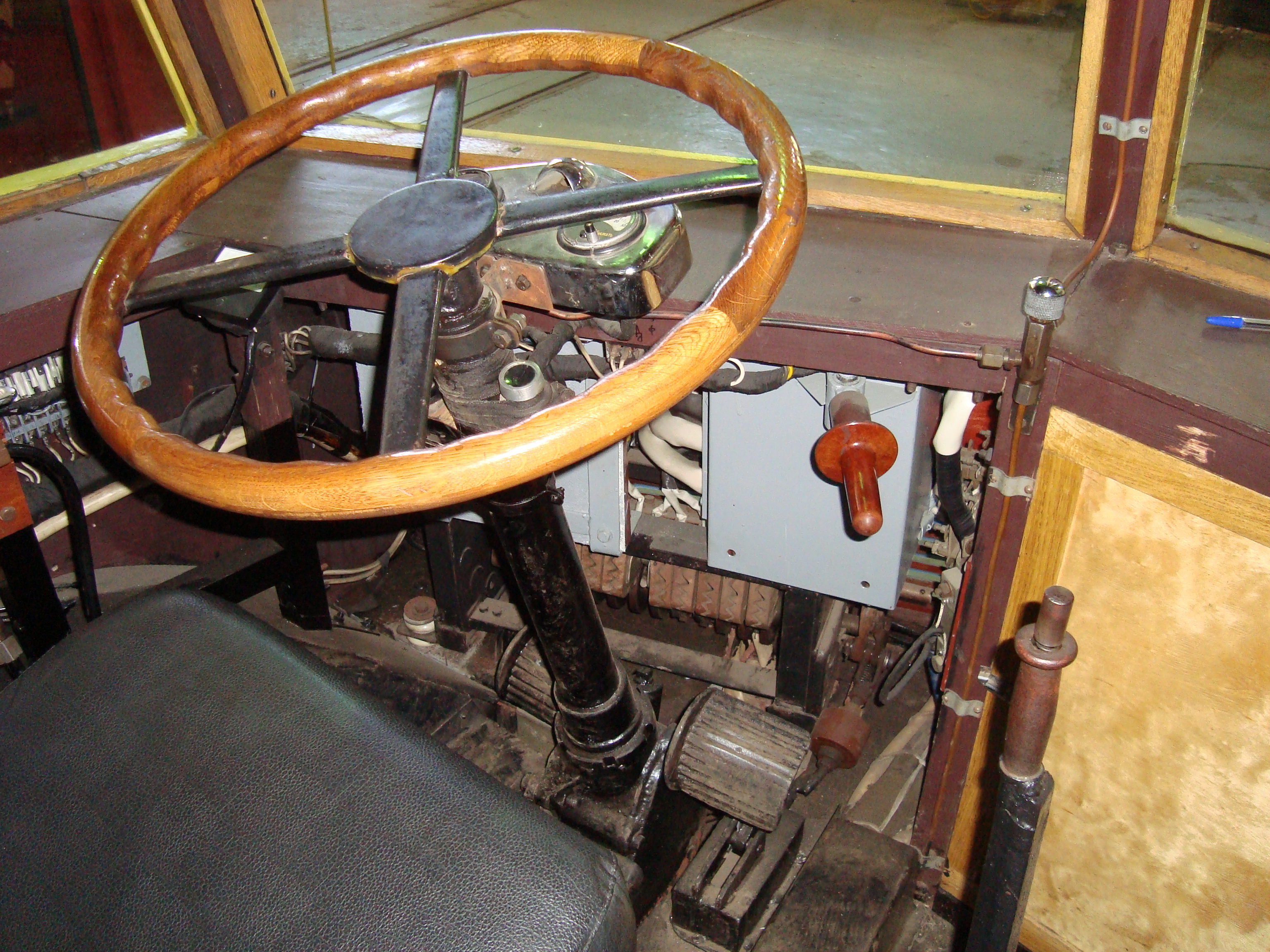 Кабина ЯТБ-1